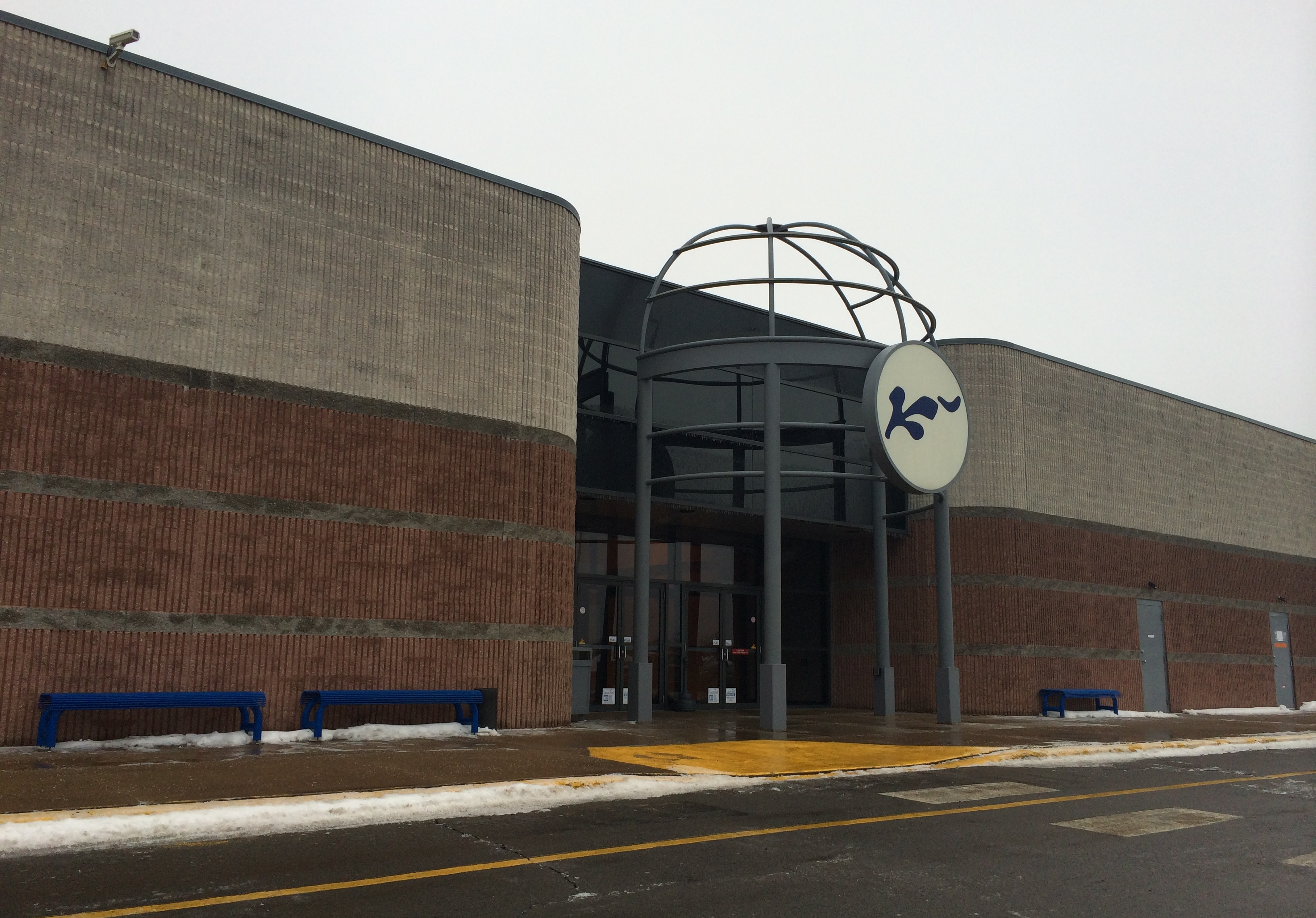 Laurel Mall Hazelton, PA